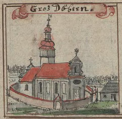 Kirche in Groß Döbern in Oberschlesien